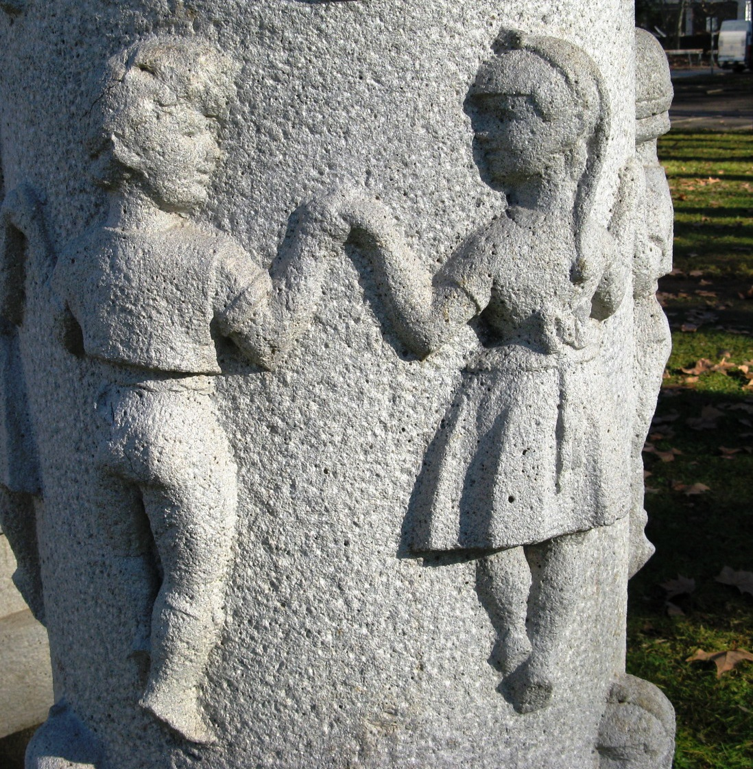 Monument Sardana Olot, section (Catalunya)